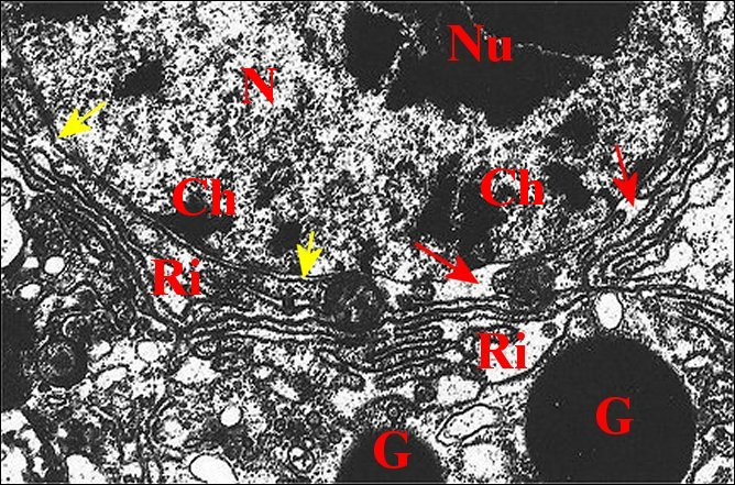 Adénocyte de glande prégonoprale chez un mâle de Pholcus phalangioides : noyau et autres organites au microscope électronique à transmission.